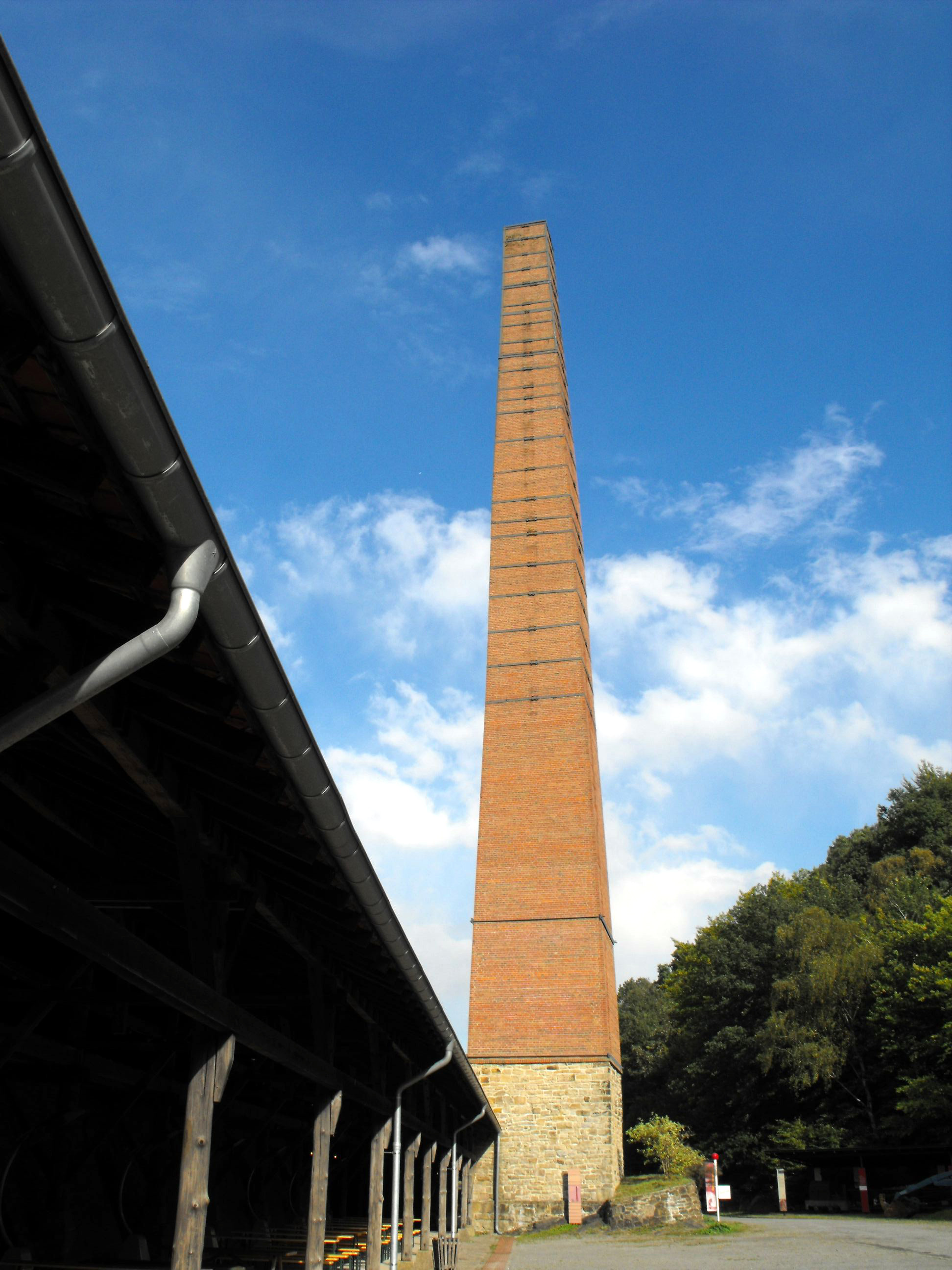 Restaurierter Schornstein der Ziegelei Dünkelberg auf dem Gebiet der ehemaligen Zeche Nachtigall in Witten; LWL-Industriemuseum Zeche Nachtigall This is a photograph of an architectural monument. (?)